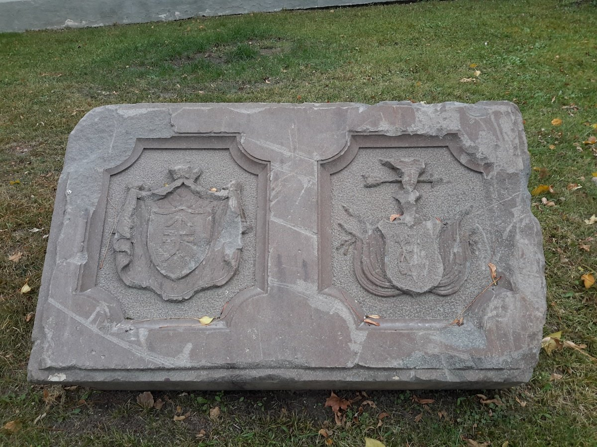 Сянно. Пліта з гербамі шляхты каля музея. Перавезена з вёскі Вялікі Азярэцк